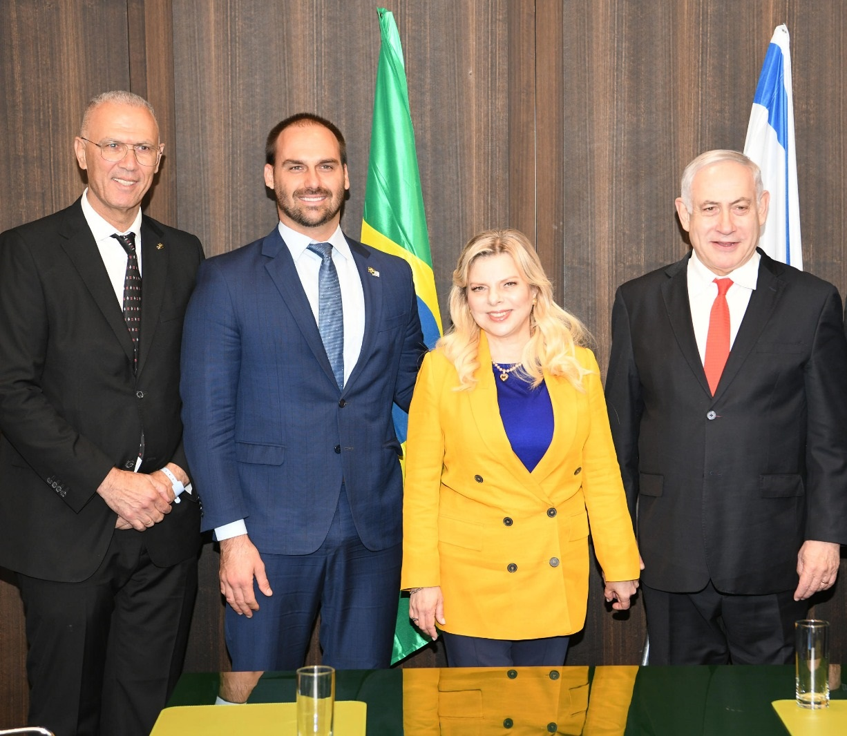 Abertura Apex Jerusalem